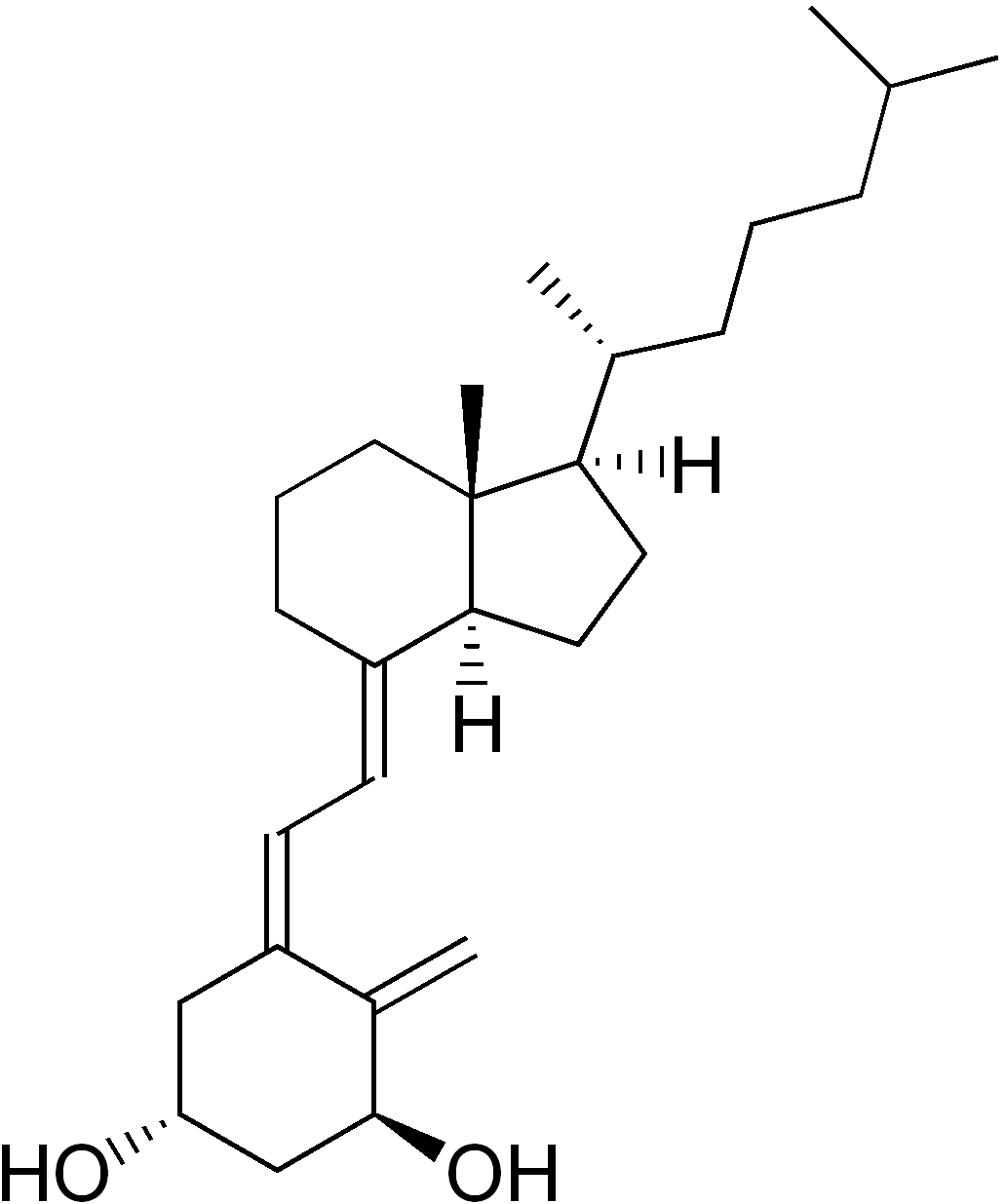 chemical structure of alfacalcidol (alphacalcidol, 1-Hydroxycholecalciferol)